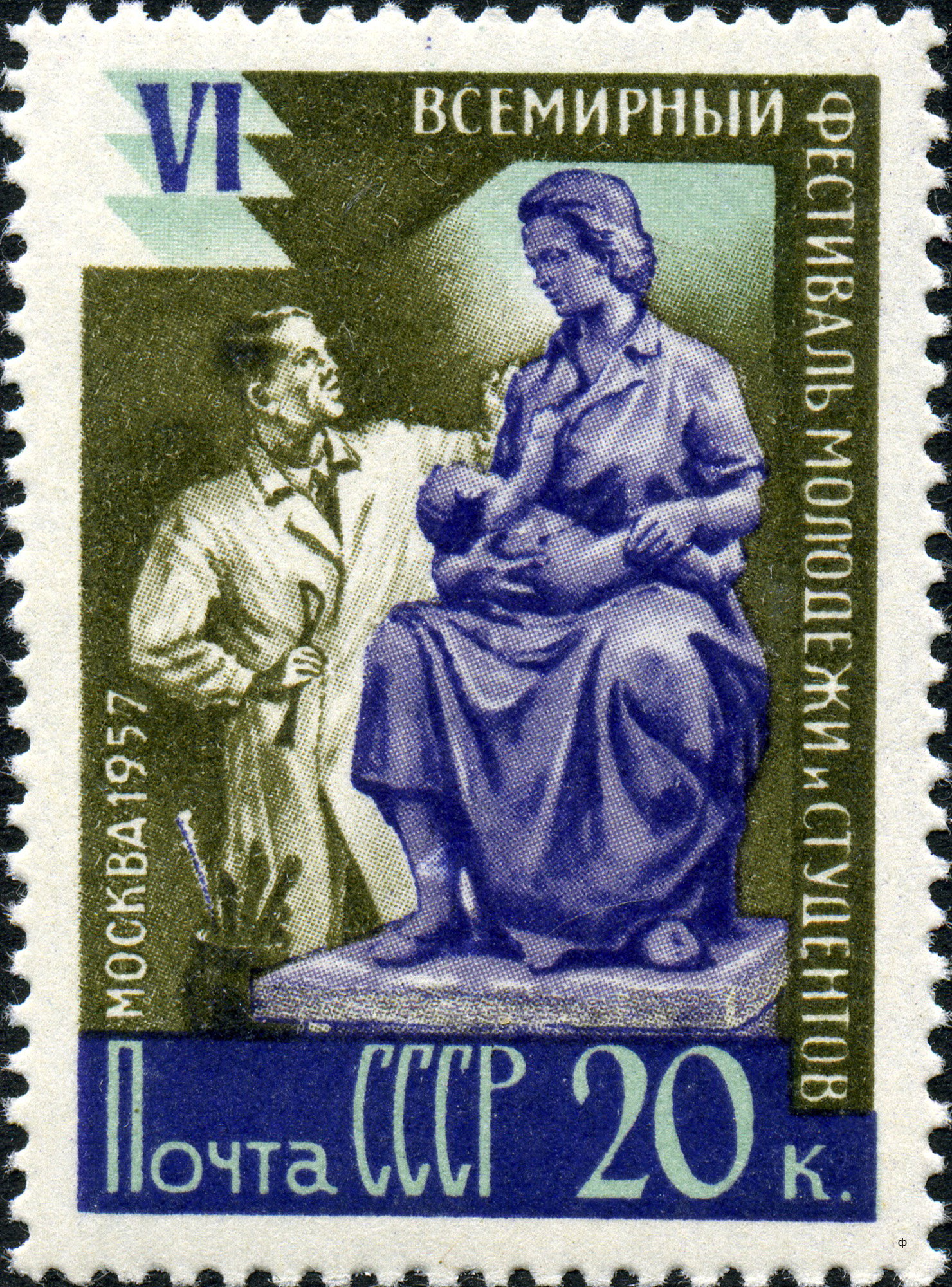 Марка СССР